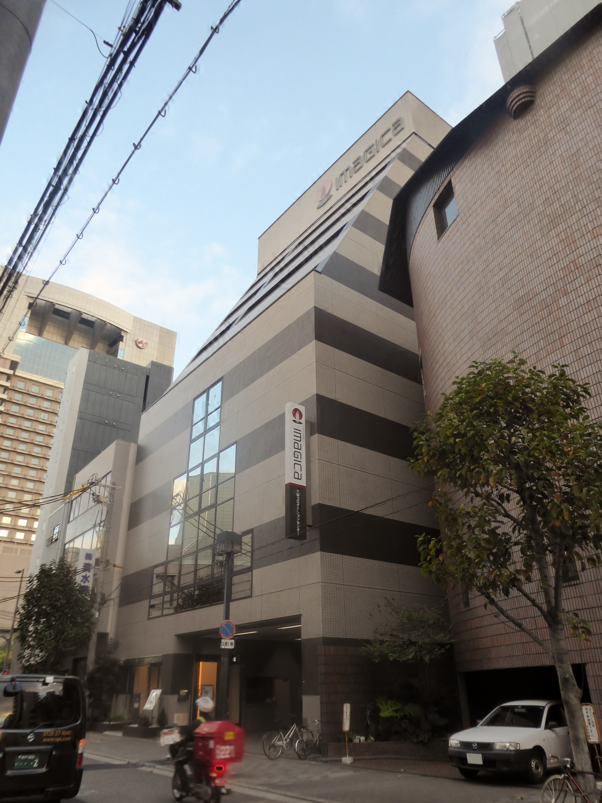 株式会社IMAGICA Lab.大阪プロダクションセンターを撮影。 Panasonic Lumix DMC-TZ60